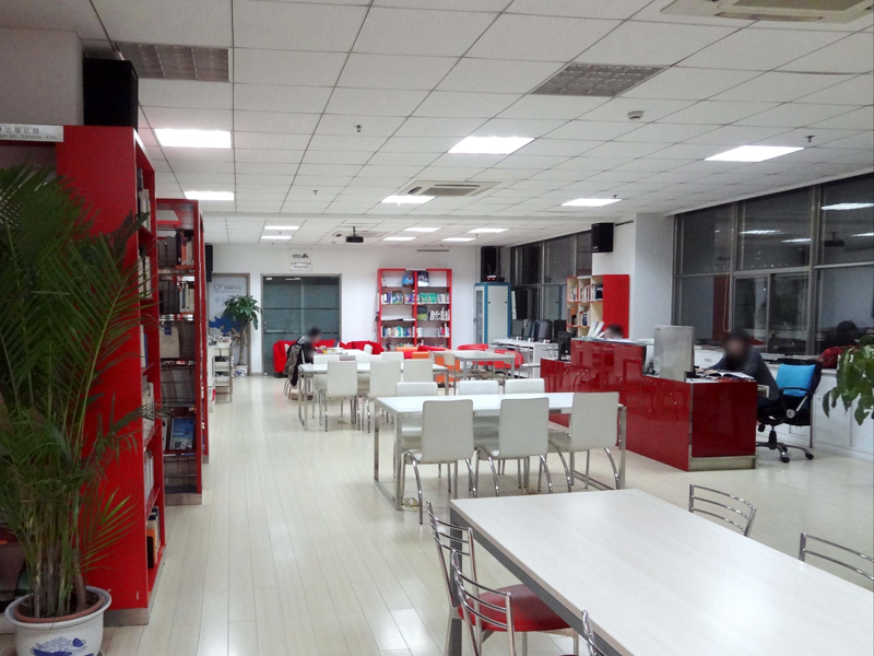 La médiathèque à l'Alliance française de Nanjing.